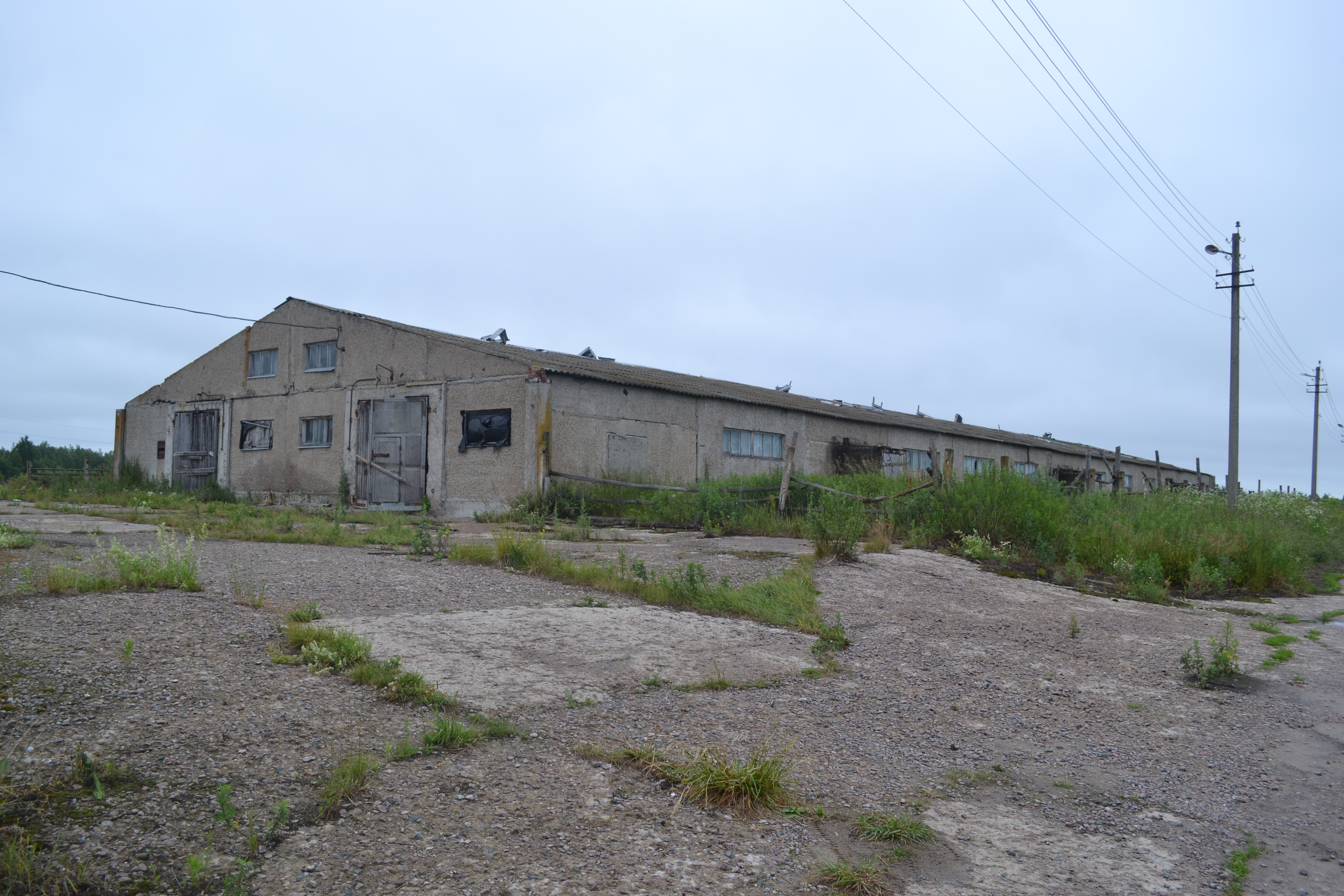 Заброшенная ферма в Демино (Шатурский район)